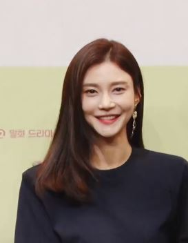 3일 오후 서울 구로구 라마다 서울 신도림에서 열린 KBS2 새 월화드라마 ‘퍼퓸’ 제작발표회가 열렸다. 이날 현장에는 김상휘 PD와 배우 신성록, 고원희, 차예련, 하재숙, 김민규가 참석했다.